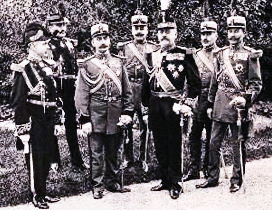 General Panait Warthiadi (Mitte) mit anderen hohen Offizieren